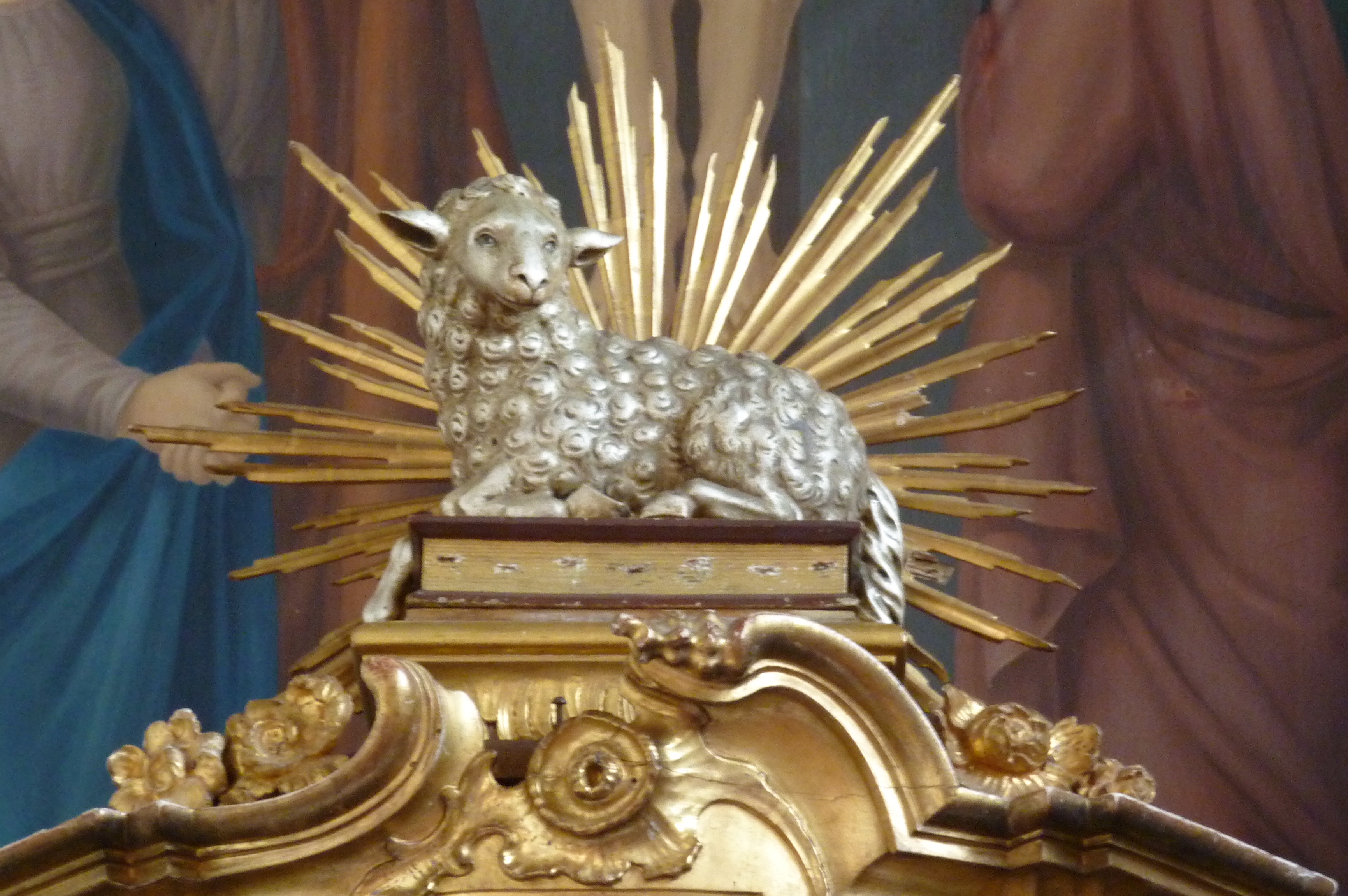 Katholische Pfarrkirche St. Vitus in Donaualtheim (Dillingen an der Donau), Lamm Gottes auf dem Buch mit sieben Siegeln, von dem Bildhauer Johann Michael Fischer (1717-1801)